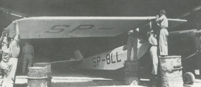 הרכבת מטוס במוסך המטוסים של חברת אוירון 1939 ארכיון ההגנה